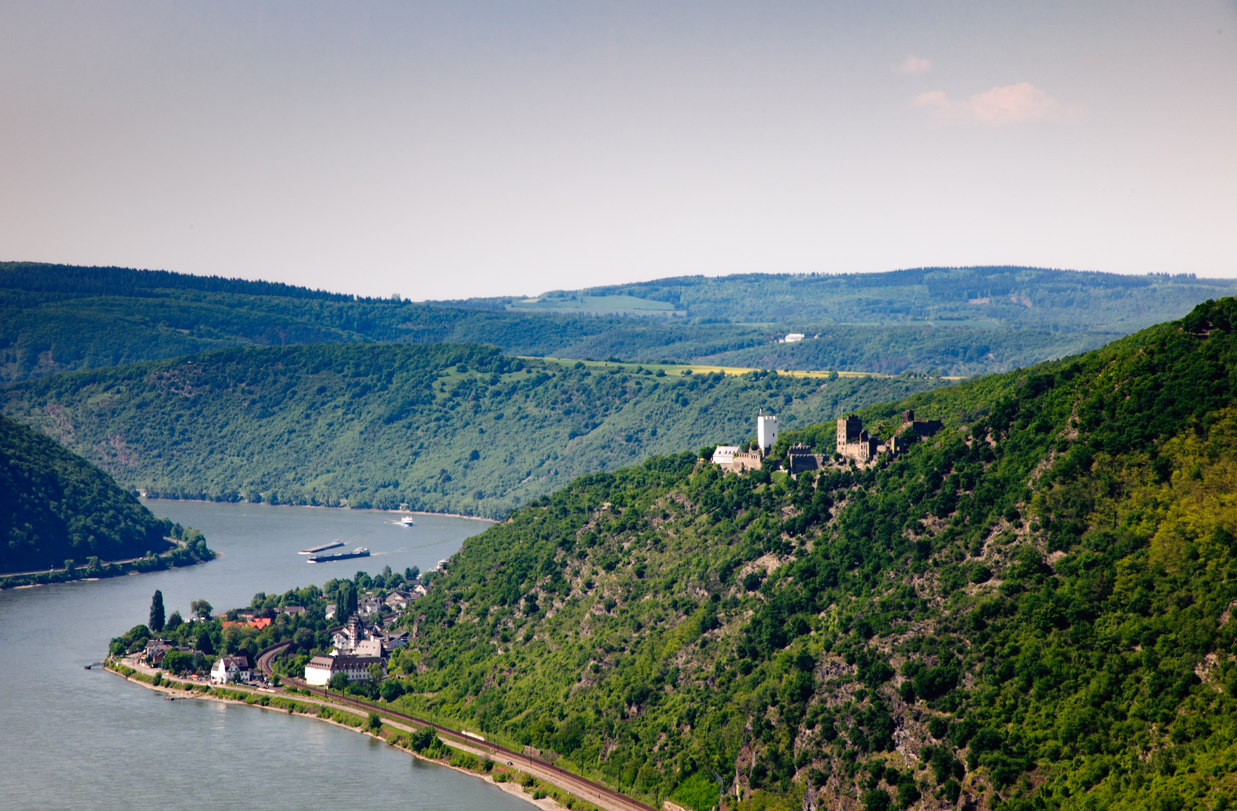 Kamp-Bornhofen mit den einer Sage nach auch als "Feindliche Brueder" bekannten Burgen Sterrenberg und Liebenstein